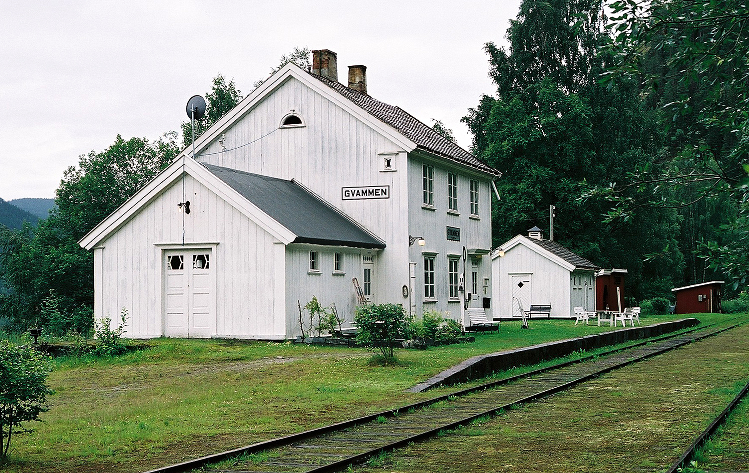 Gvammen stasjon, Numedalsbanen.